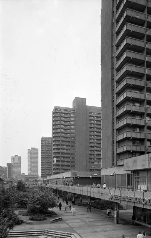 11.-18.8.1991 Bundesland Sachsen-Anhalt Halle-Neustadt Neubaugebiet im Stile des Brutalismus